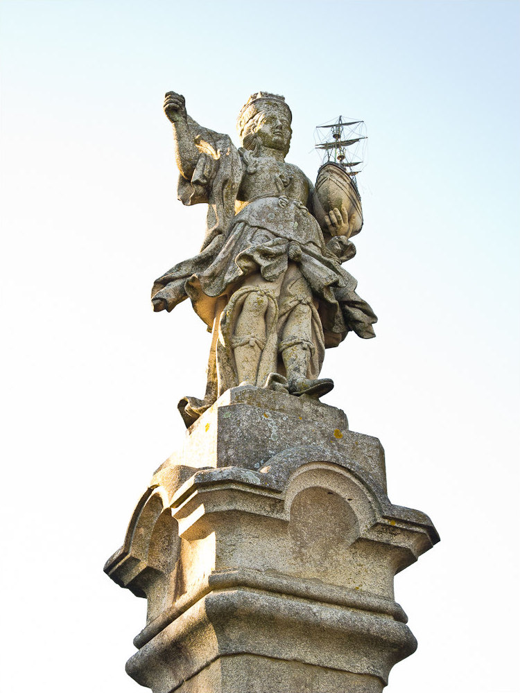 Portugal